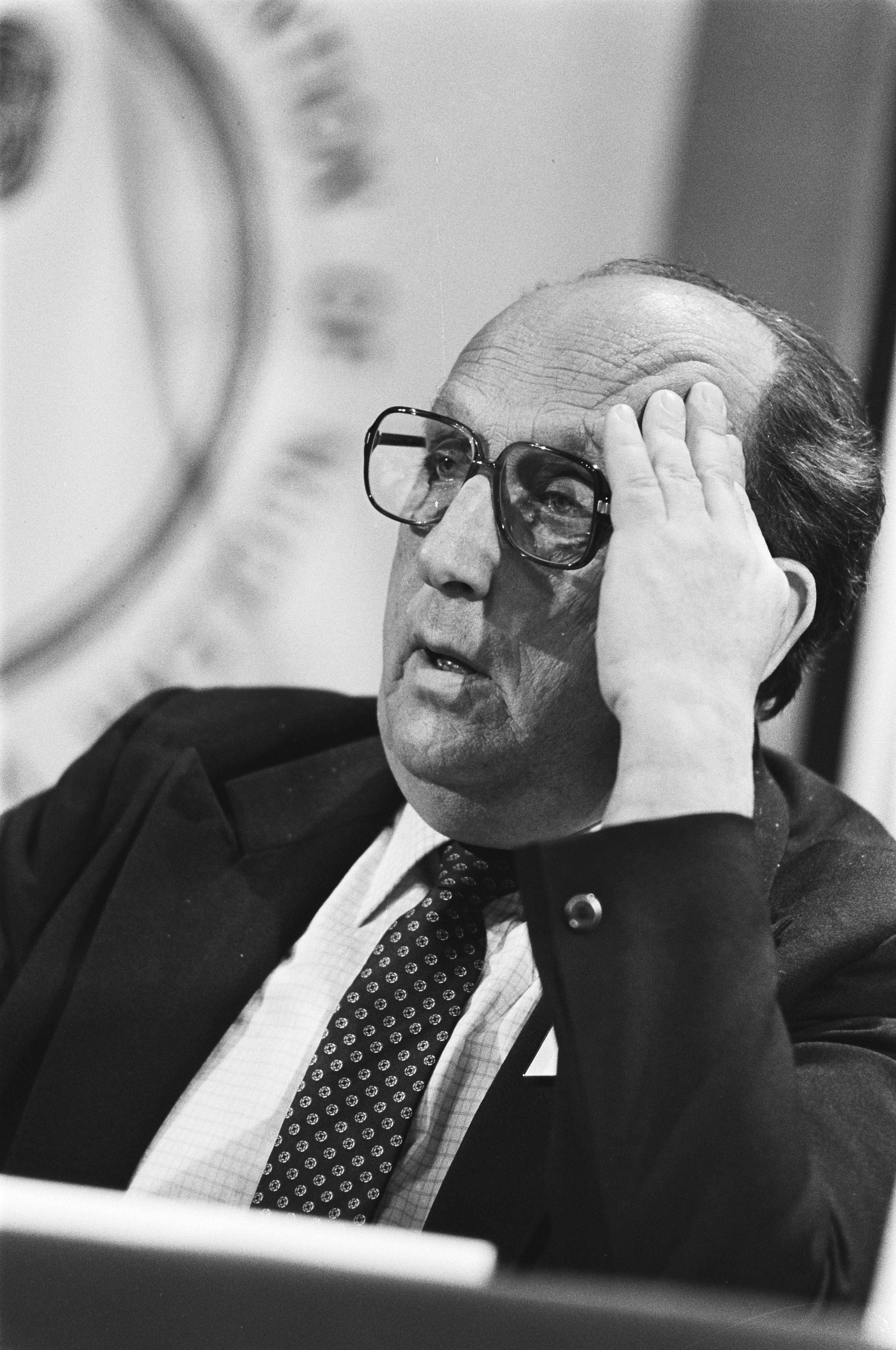 Collectie / Archief : Fotocollectie Anefo Reportage / Serie : Artsencongres tegen kernwapenoorlog door de International Physicians for the Prevention of Nuclear War (IPPNW) in Amsterdam Beschrijving : Panellid Georgy Arbatov Annotatie : Randnummers negatiefstrook: nr.7: Noel Gayler Datum : 18 juni 1983 Locatie : Amsterdam, Noord-Holland Trefwoorden : antikernwapenbeweging, artsen, conferenties, kernwapens, politici, portretten, premiers Persoonsnaam : Arbatov, Georgy Fotograaf : Bogaerts, Rob / Anefo Auteursrechthebbende : Nationaal Archief Materiaalsoort : Negatief (zwart/wit) Nummer archiefinventaris : bekijk toegang 2.24.01.05 Bestanddeelnummer : 932-6260